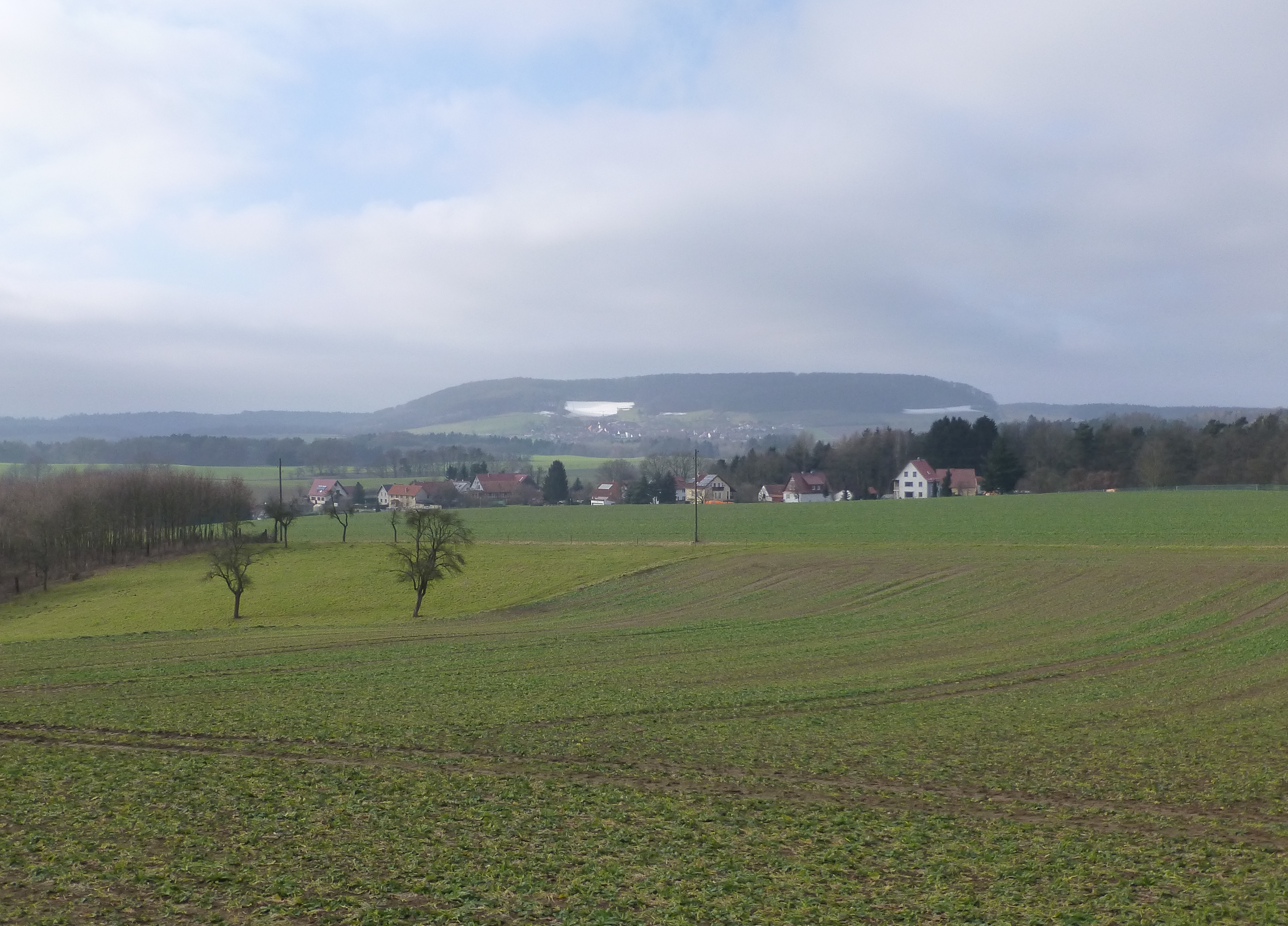 Blick über Gänseteich (im Hintergrund ist der Rohrberg zu sehen)